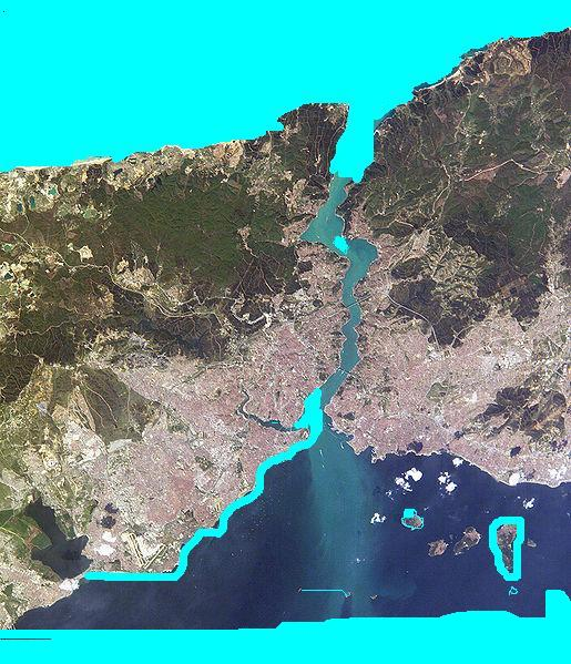 Afalinanın Boğaz üzerindeki dağılımı